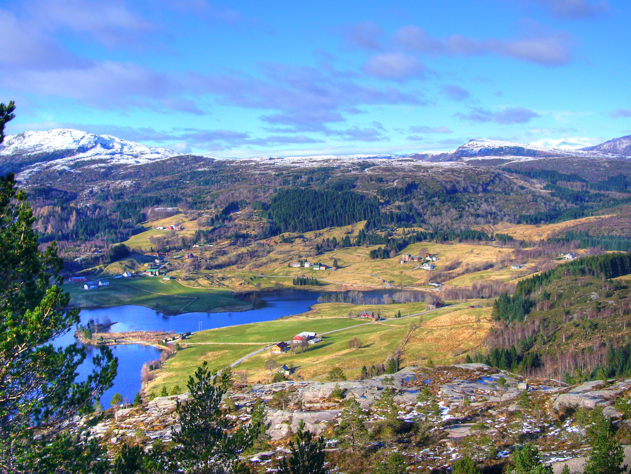 Birkeland Akse Hyllestad HDR Photomatix